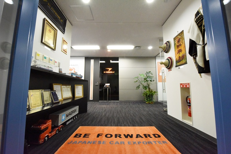 エントランス